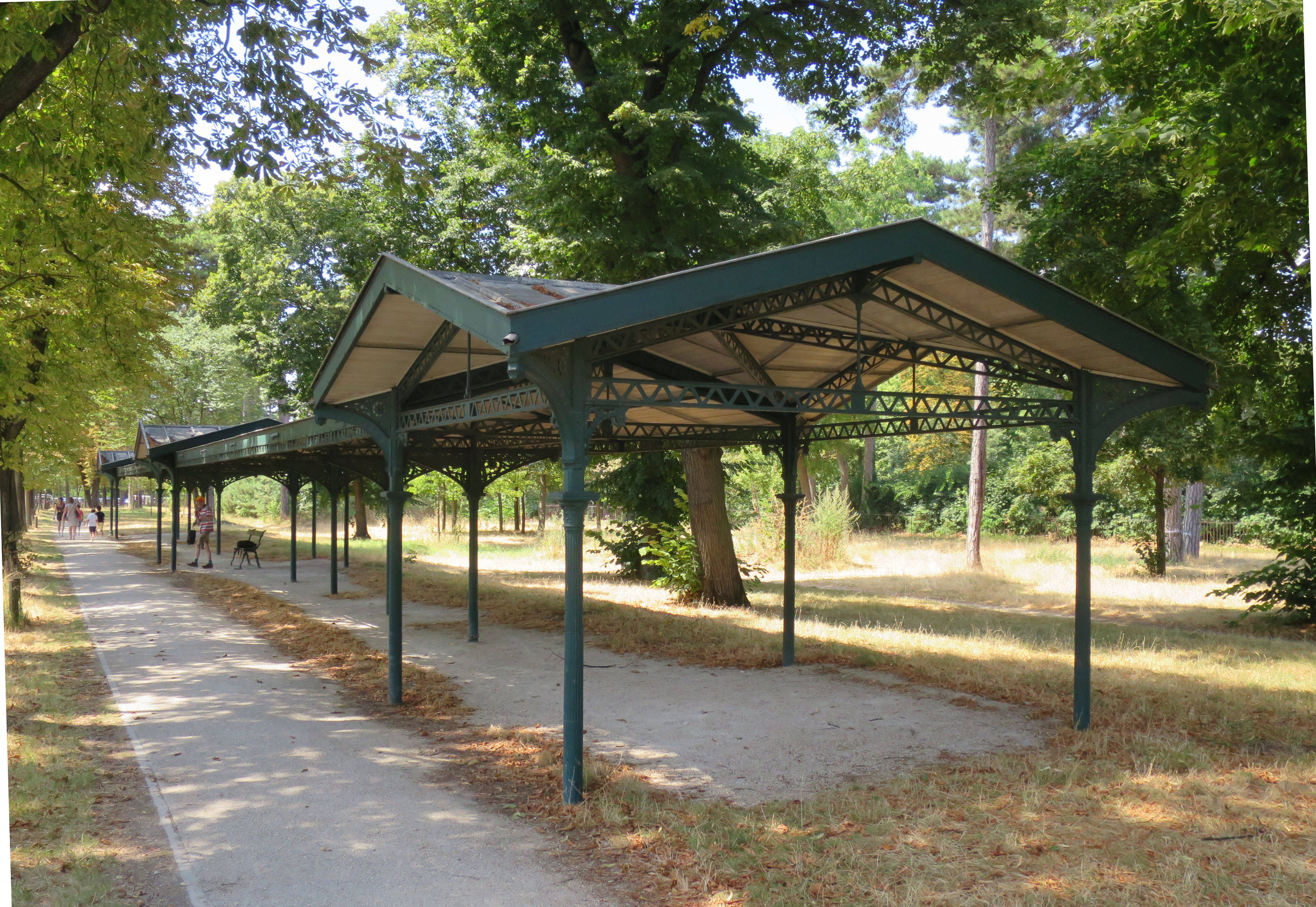 Historisches Bahnsteigdach von 1878